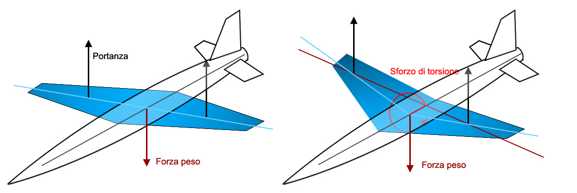 Pregi strutturali di un'ala obliqua